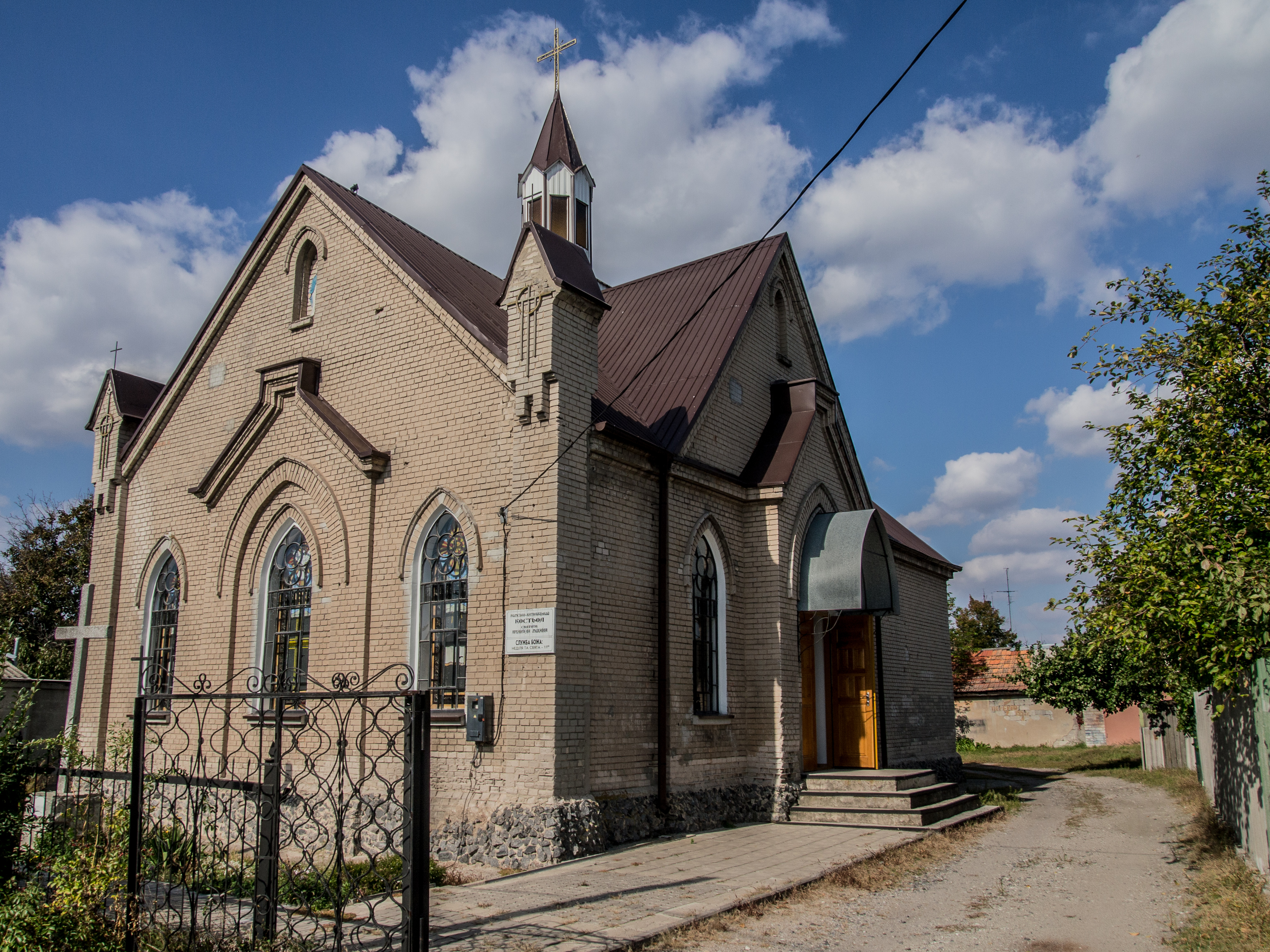 Римсько-католицький костьол святого архангела Михаїла, Павлоград, вул.Пролетарська, 29